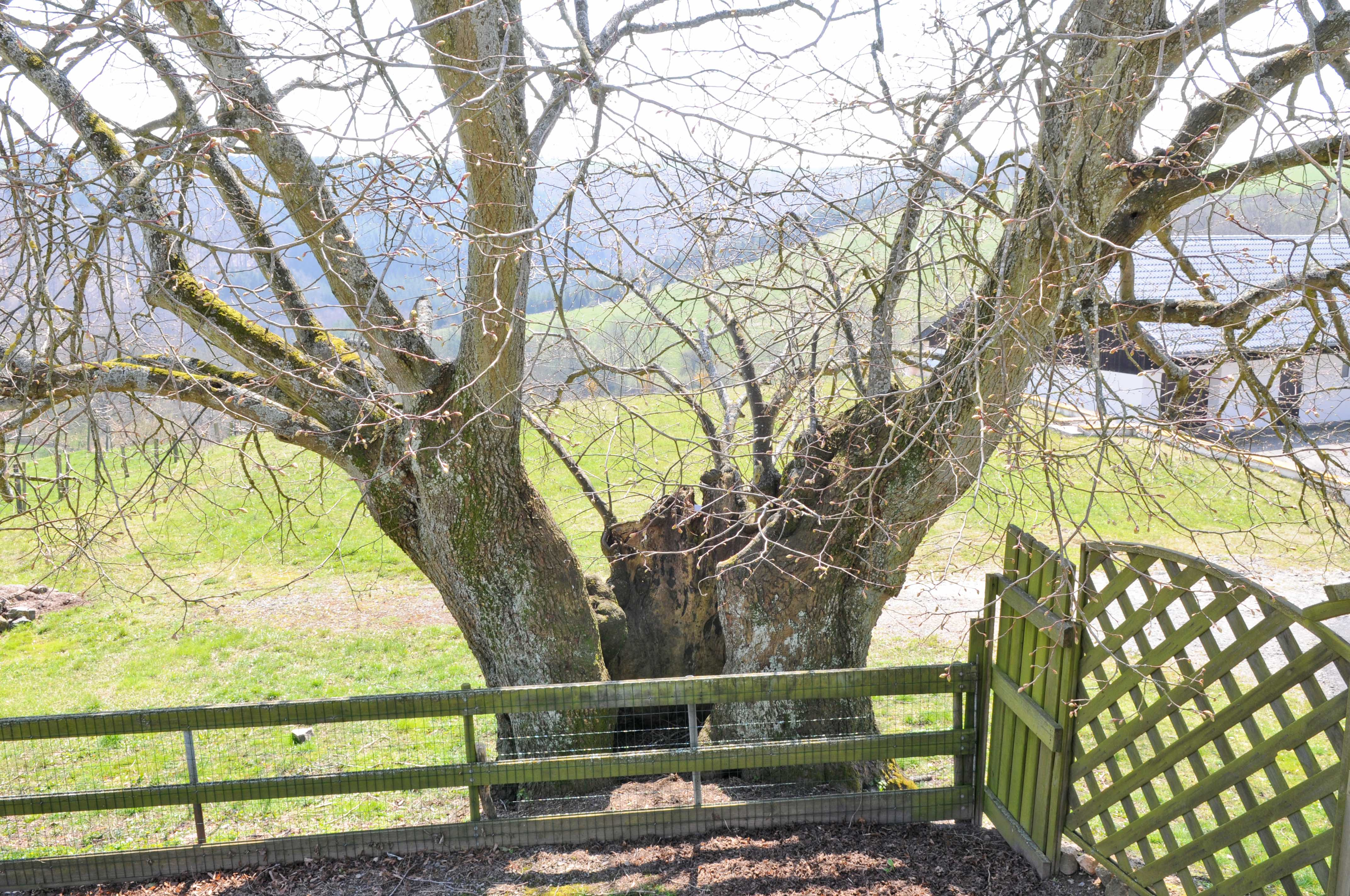 Lann zu Pëtscht.